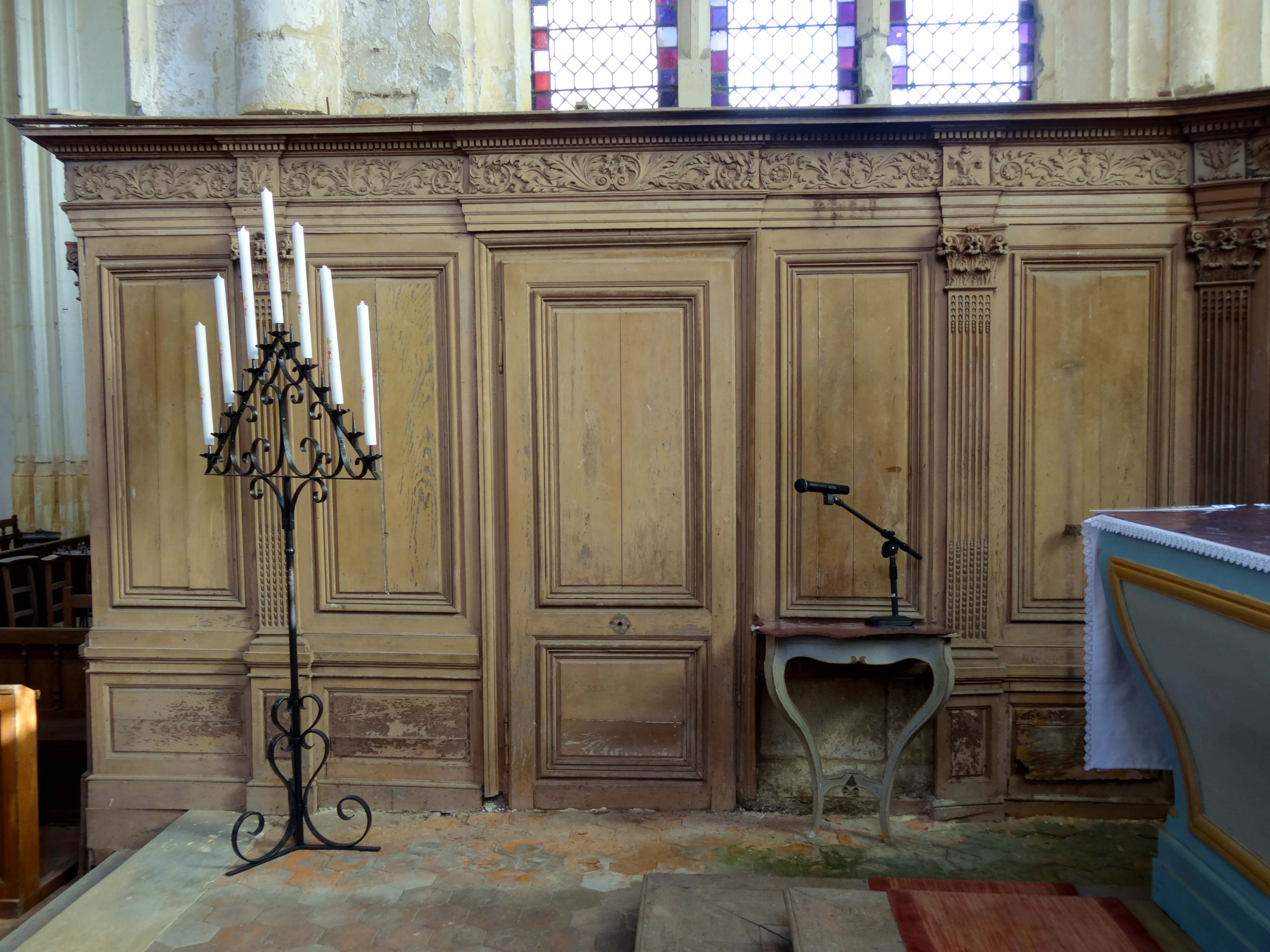 Mobilier de l'église - voir titre.